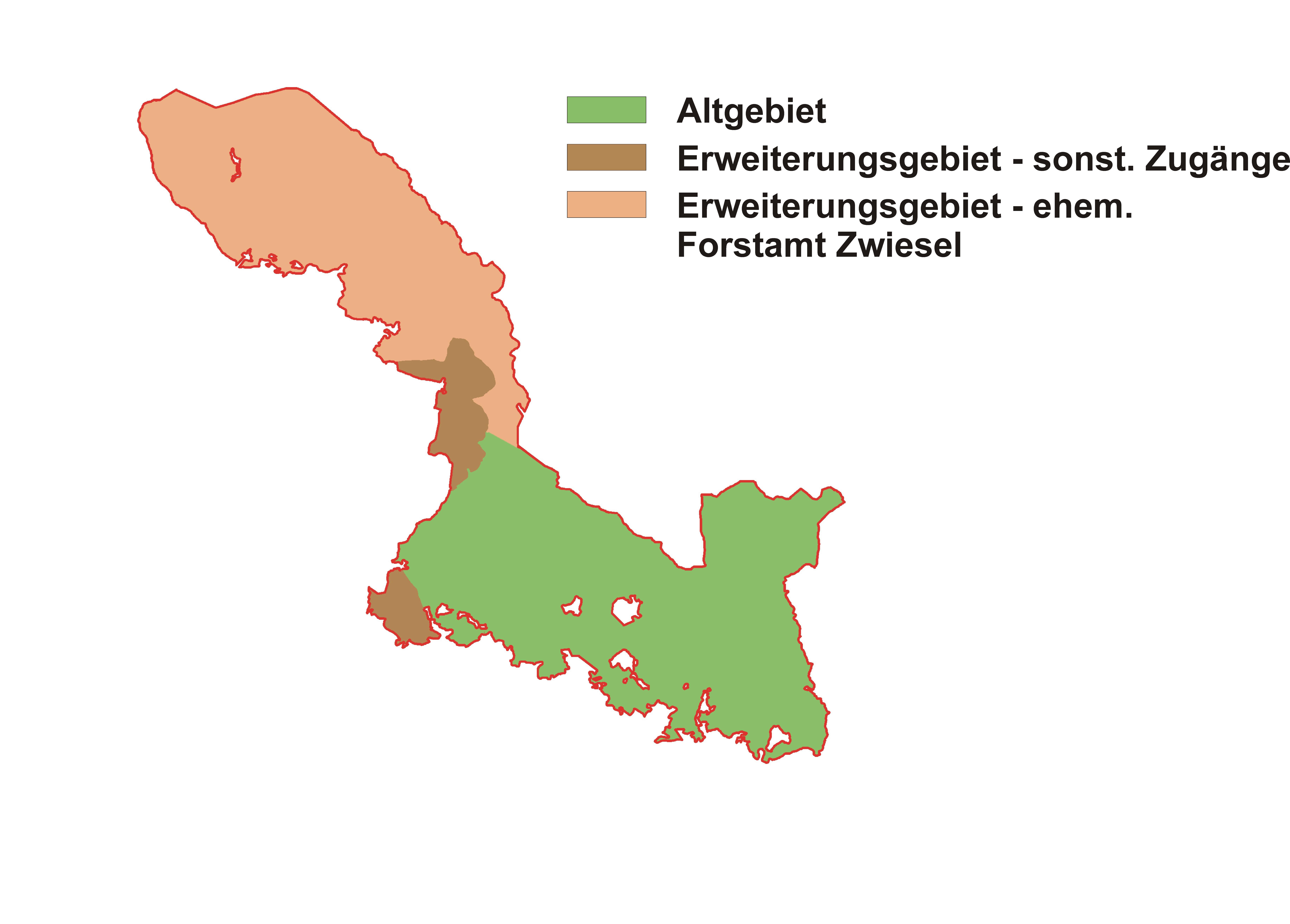 Nationalpark Bayerischer Wald, Eweiterung